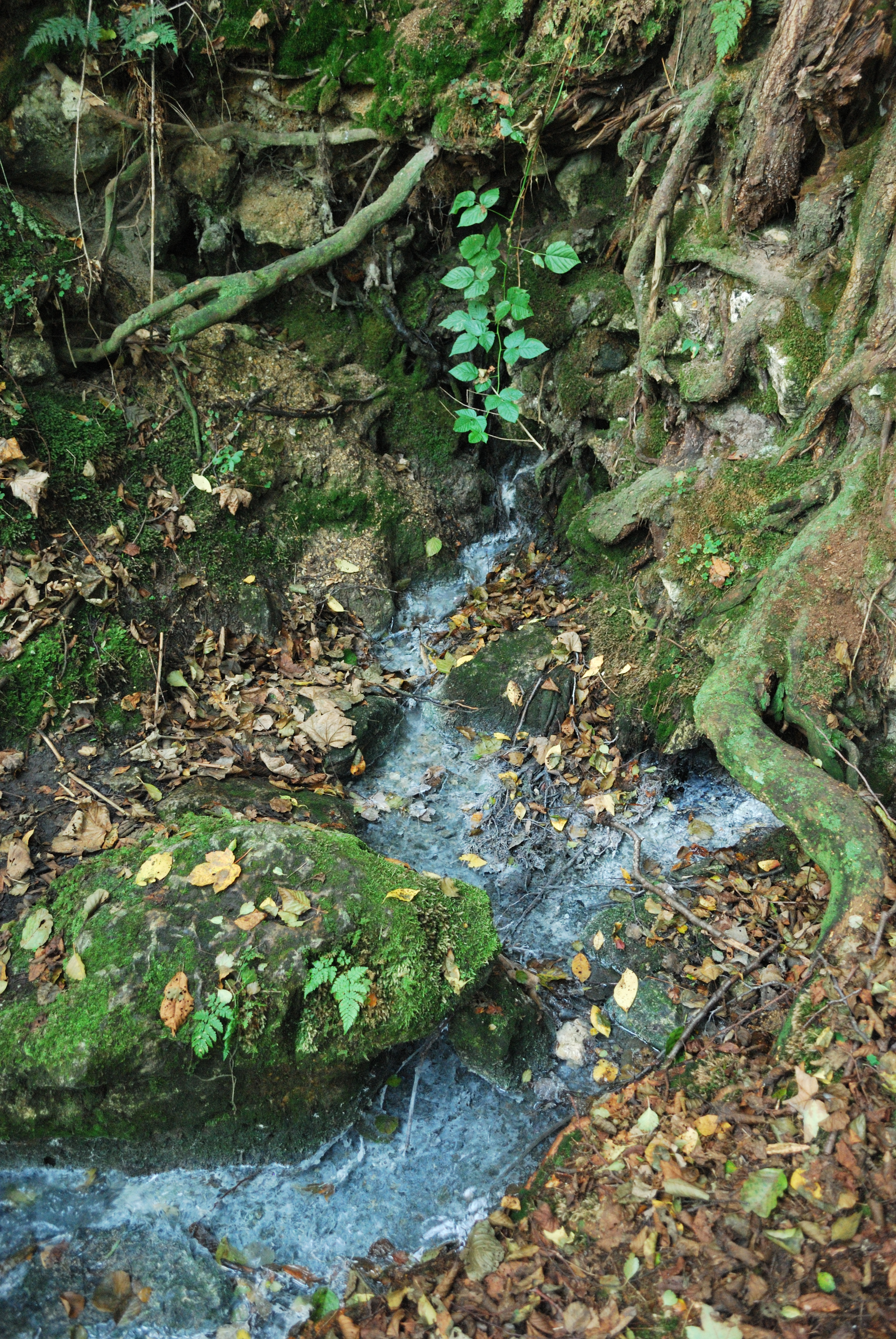 Das Foto zeigt eine schwefel- und kalkhaltige Quelle mit Mineralablagerungen innerhalb des Sippenauer Moors (Naturschutzgebiet NSG-00009.01, Geotop-Nr. 273Q001) im Landkreis Kelheim, zugehörig zum Gemeindegebiet Saal an der Donau in Niederbayern, Deutschland.